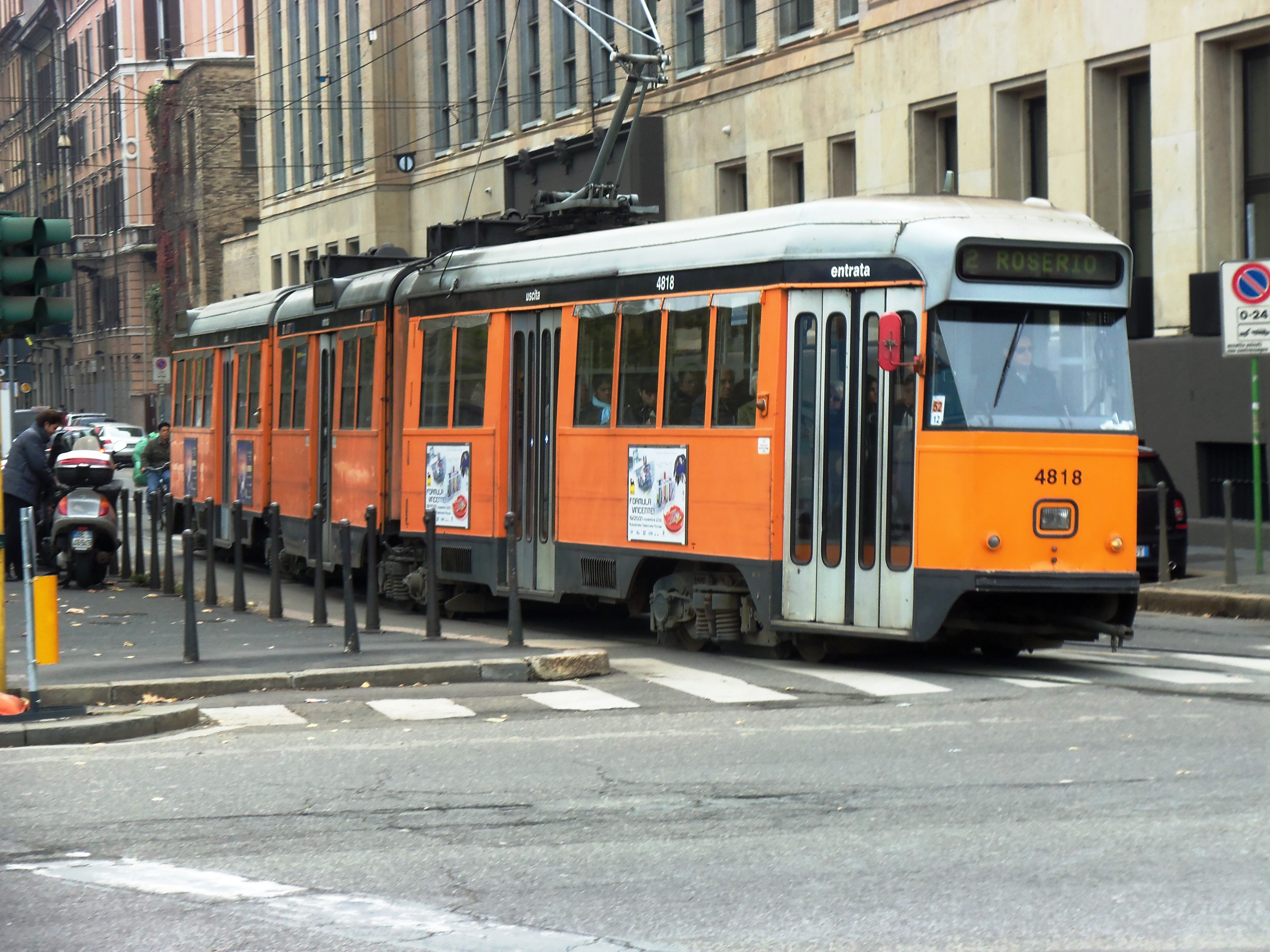 Vettura tranviaria serie 4800 dell'ATM di Milano svolta da via Ceresio in piazzale Cimitero Monumentale